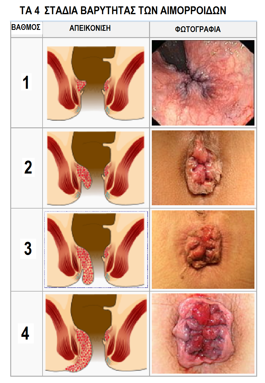 Στάδια αιμορροίδων Dr. Joachim Guntau - the copyright holder of this work, hereby publishes it under the following license: Attribution: Dr. Joachim Guntau